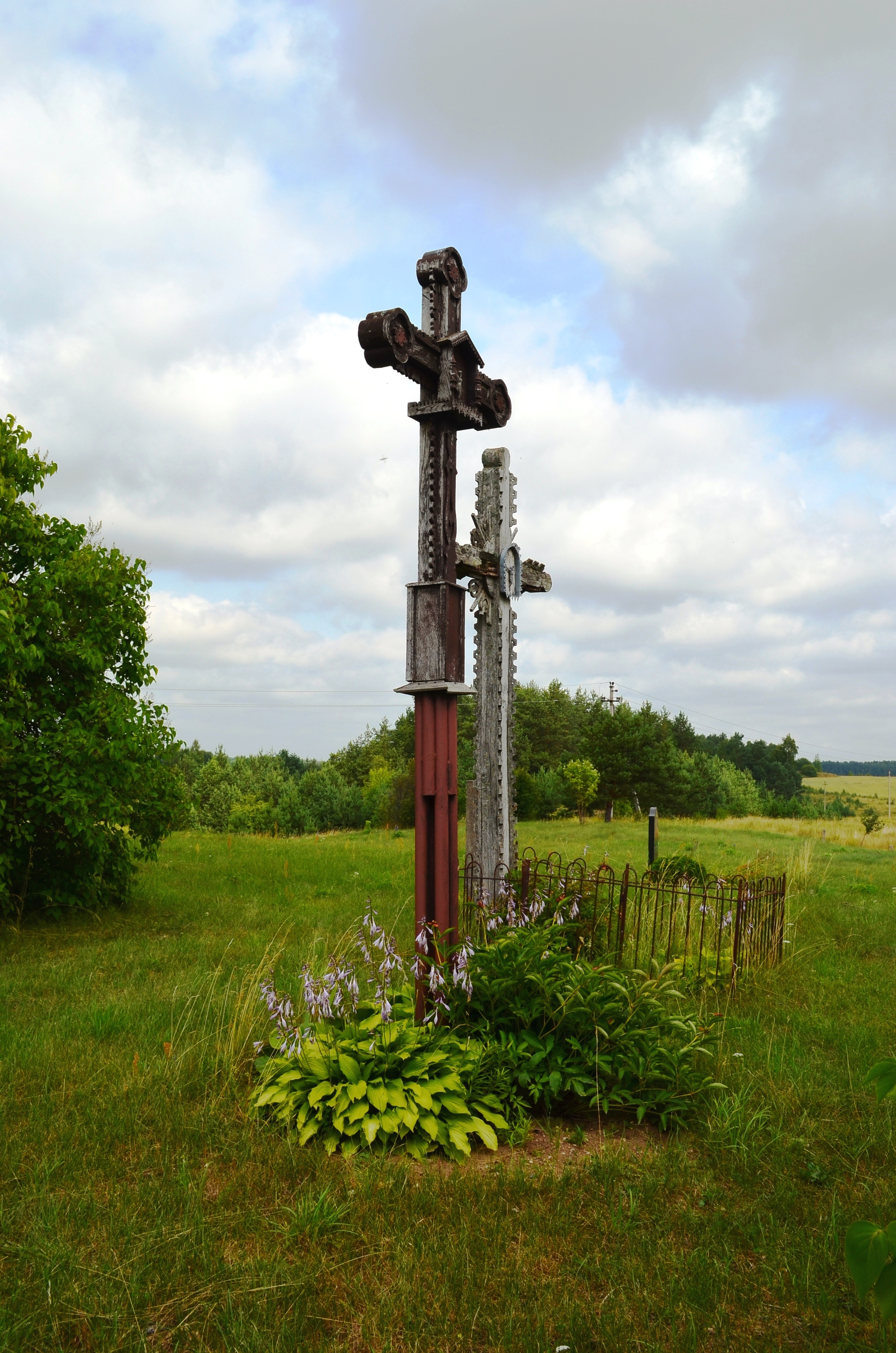 Paminkliniai kryžiai, Pakryžė, Molėtų r.